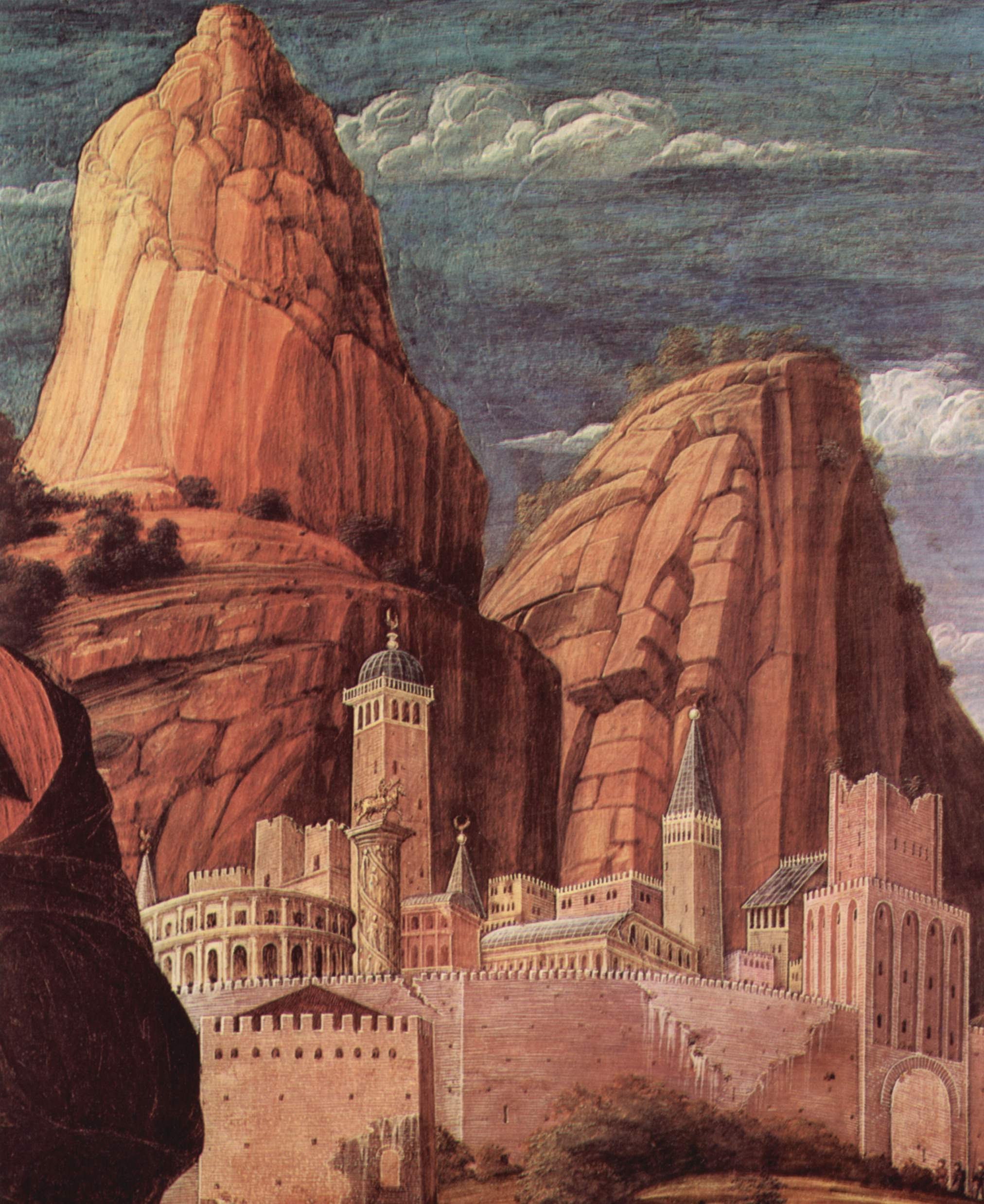 Landschaft mit Stadt